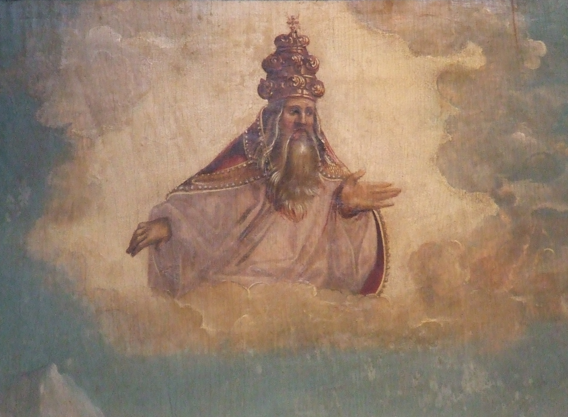 Gott (Vater), Detail aus dem Gemälde "Apostelabschied" von Jörg Breu d. Ä., 1514. Fotografiert in der Staatsgalerie Augsburg beim Wikipedia-Süddeutschland-Treffen vom 26. bis 28. Oktober 2012 in Augsburg.